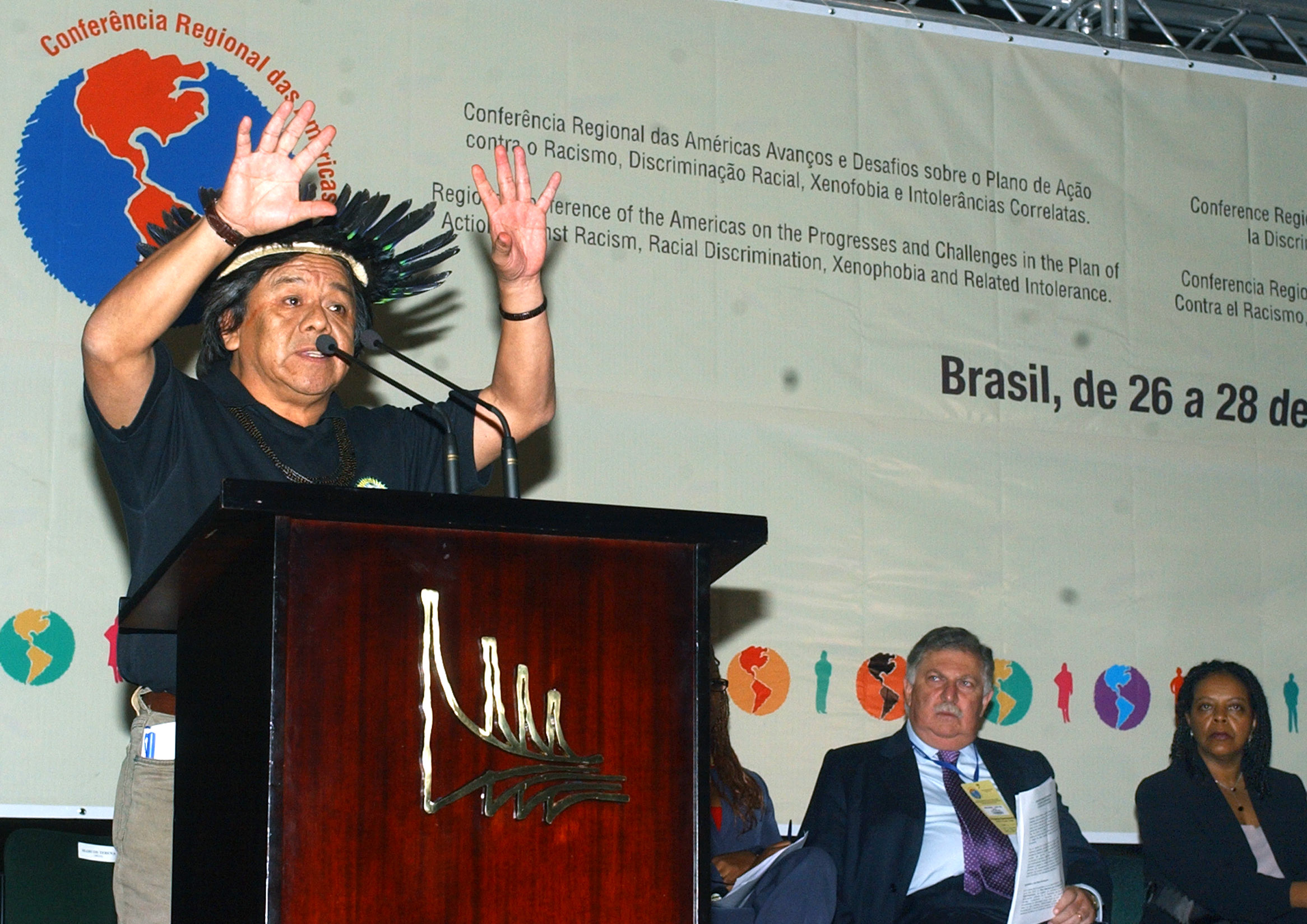 O articulador dos direitos indígenas, Marcos Terena, fala na abertura da Conferência Regional das Américas sobre os Avanços do Plano de Ação contra o Racismo, a Discriminação Racial, a Xenofobia e Intolerâncias Correlatas.